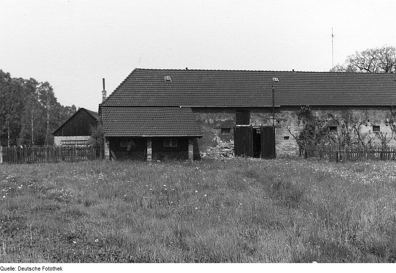 Original image description from the Deutsche Fotothek Senftenberg-Hosena. Ehem. Blutmühle